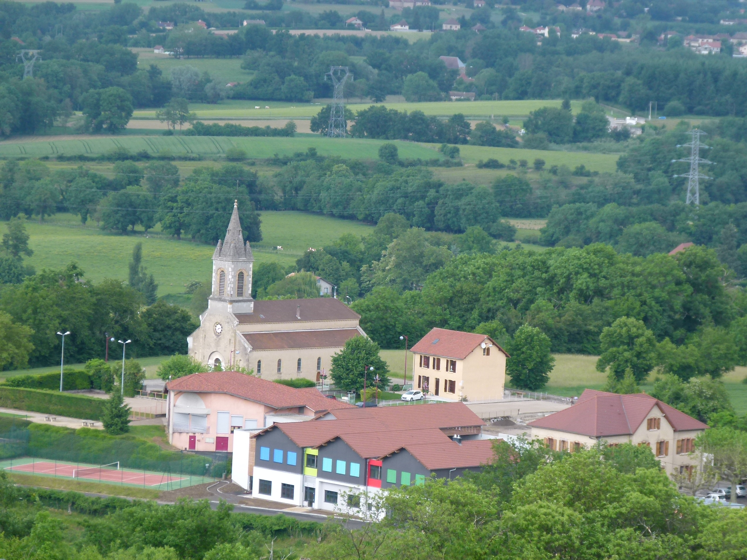 Le centre de notre village